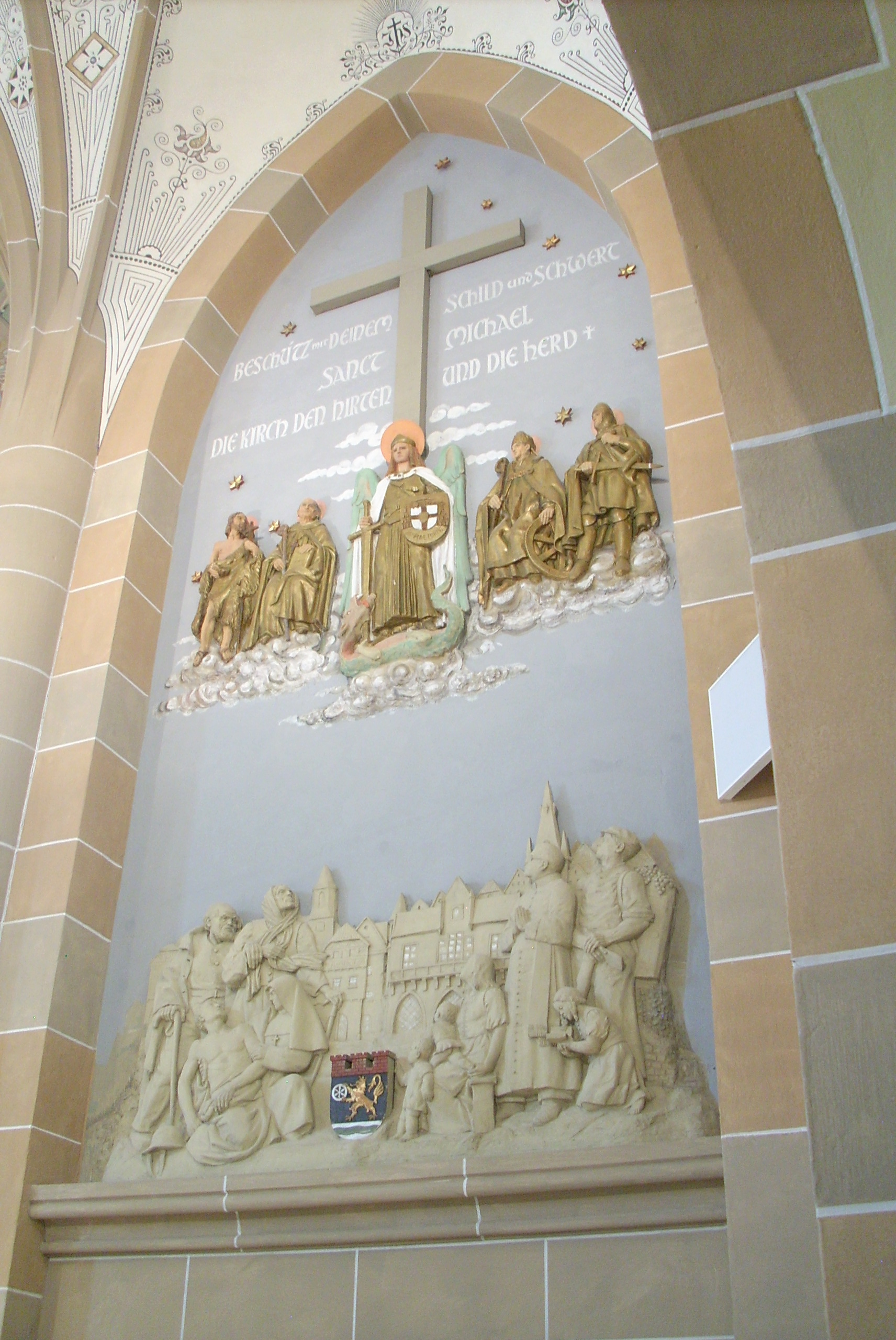 Heimatbezogene Wandfläche Pfarrkirche St. Matthäus Bad Sobernheim